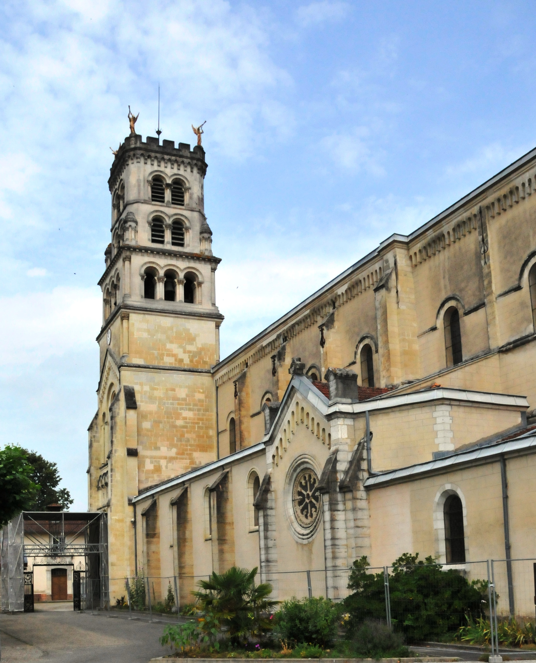 Buglose, N.D. de Buglose